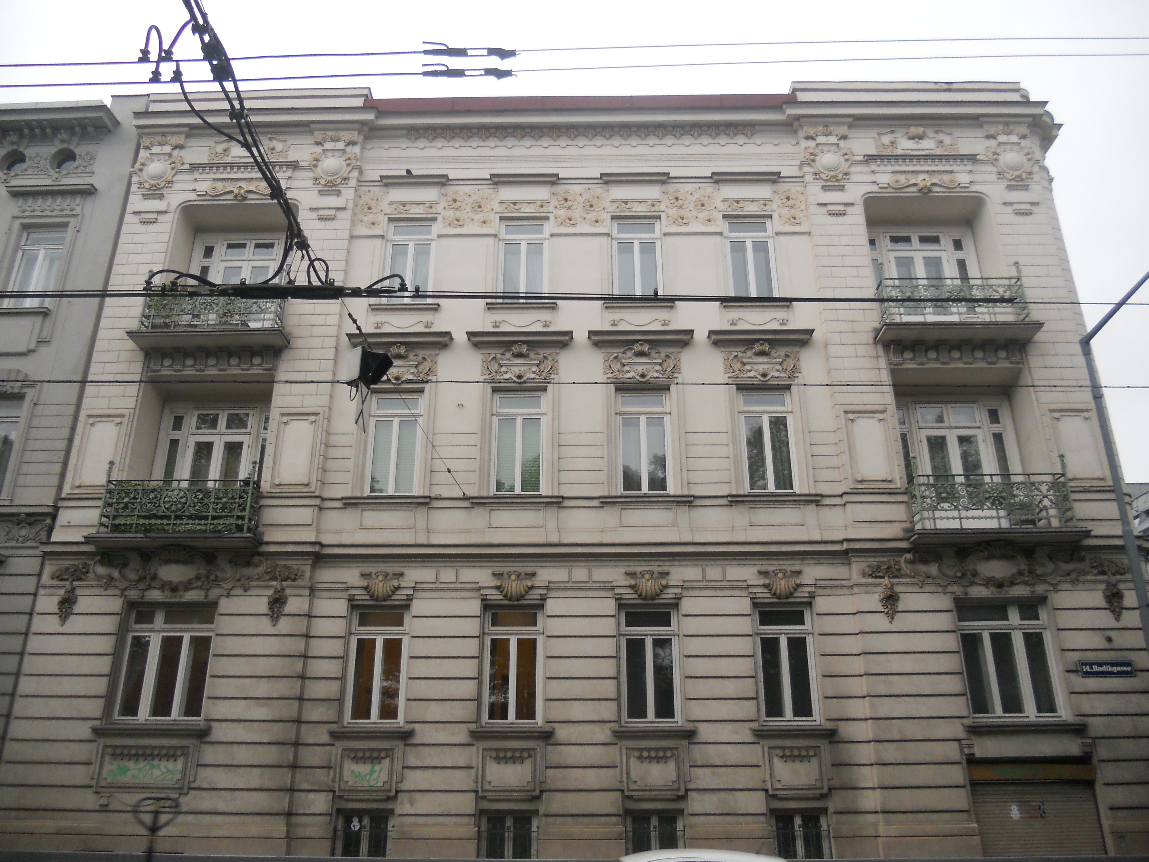 Haus Gyrowetzgasse 1 (= Hadikgasse 54) in Wien